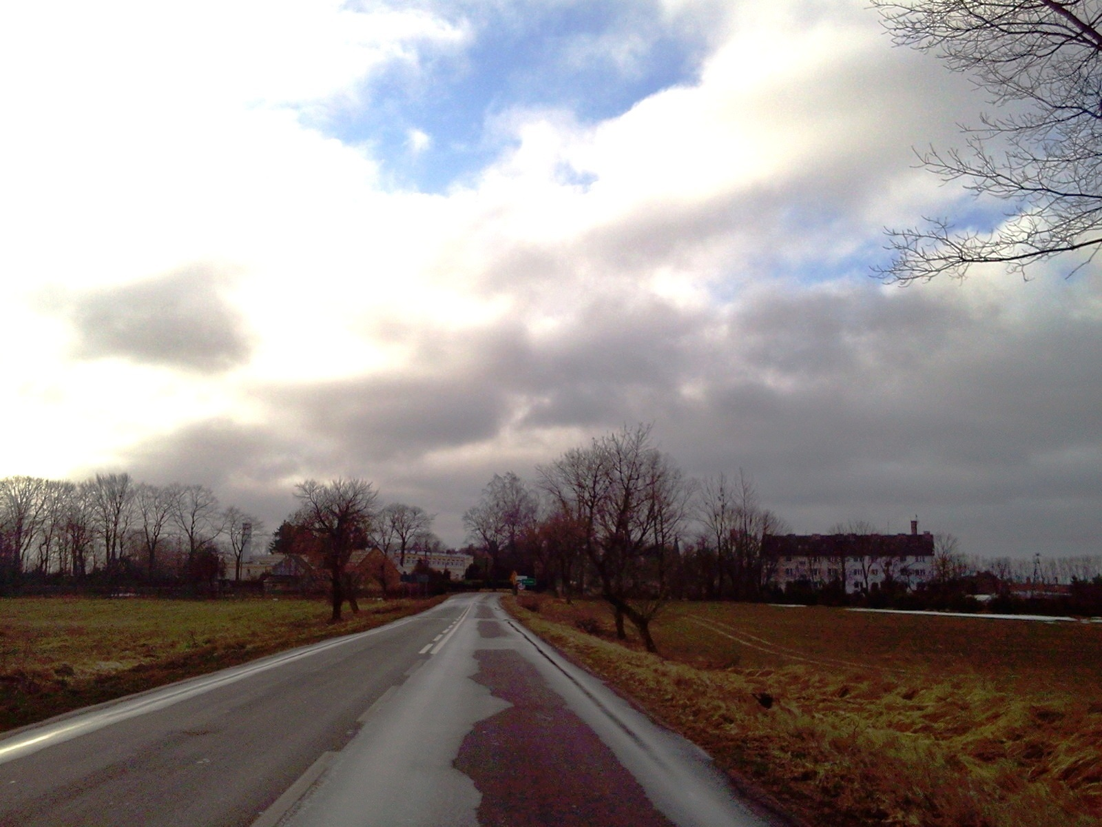 Bełczna